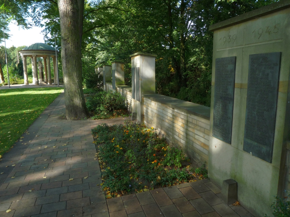 Rietberg, Steinpavillion als Denkmal für die Opfer des 1. Weltkrieges (erbaut 1939) und später errichtete Gedenktafeln für die Opfer des 2. Weltkrieges